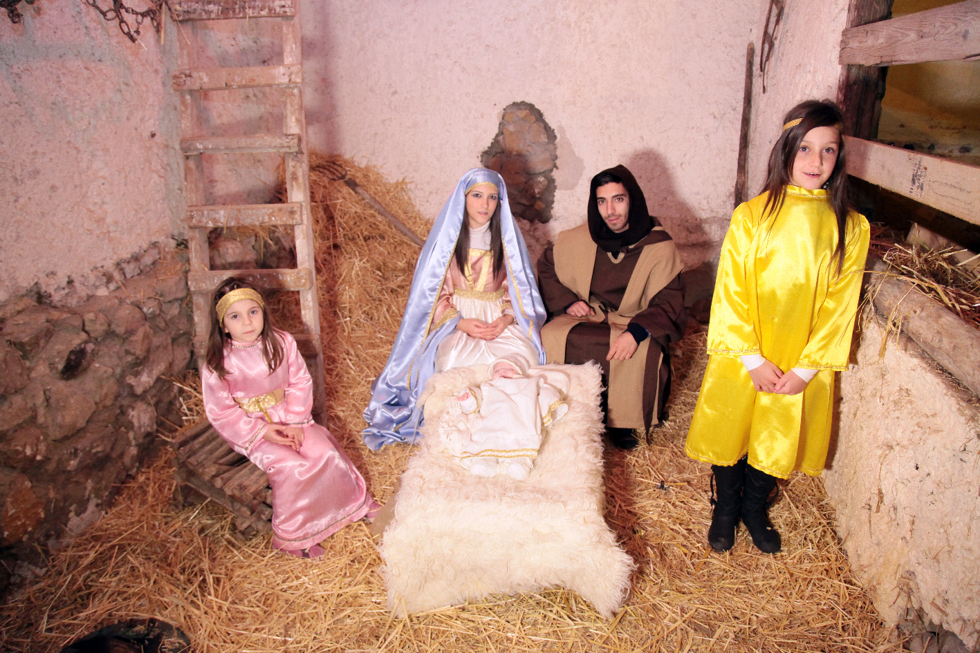 La Sacra Famiglia nella grotta con due angioletti, Natale 2013.